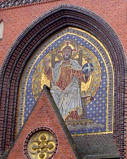 Mosaik am Hauptportal der Auenkirche in Berlin-Wilmersdorf